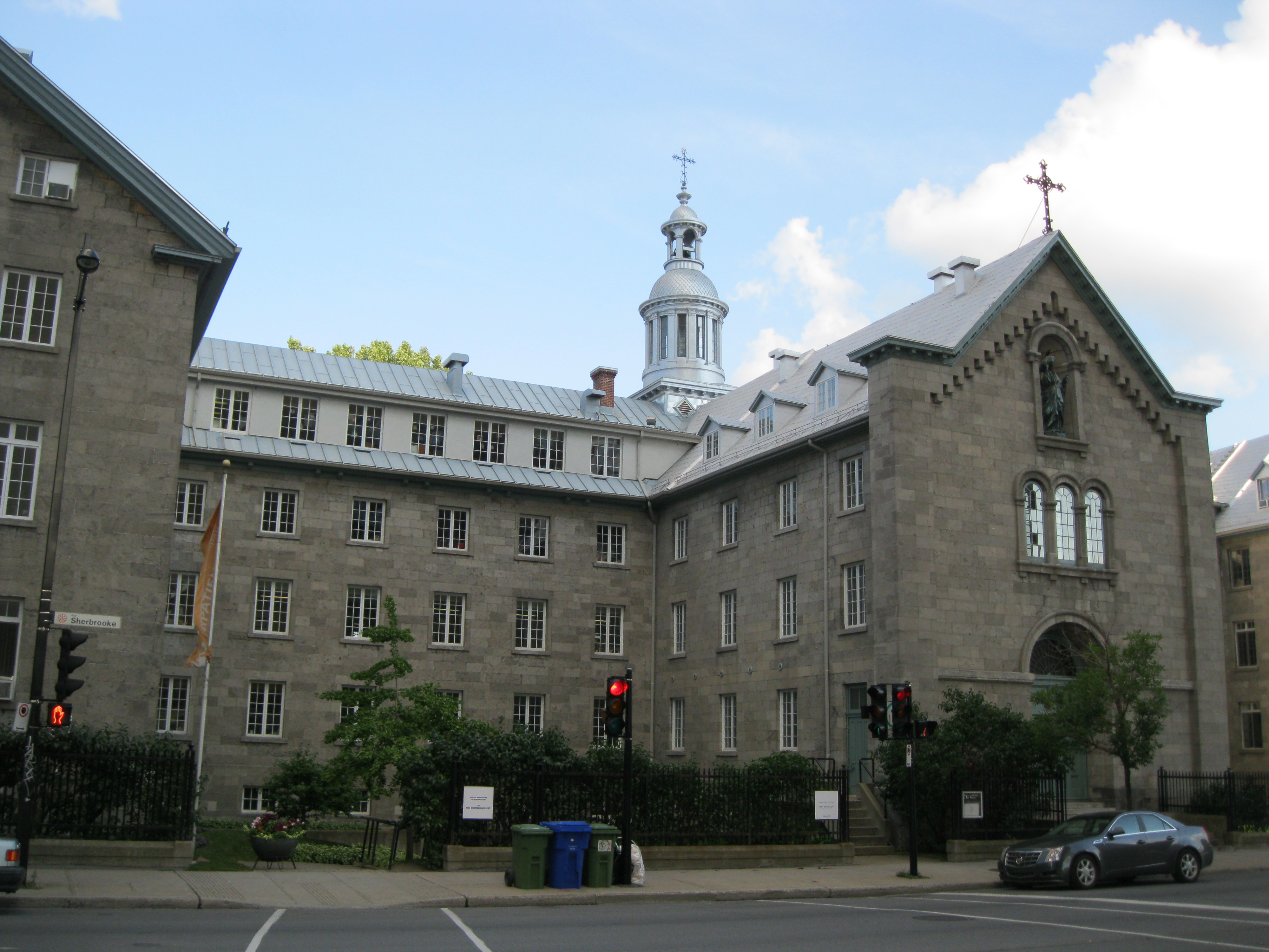 Le monastère du Bon-Pasteur, classé monument historique, est un ensemble conventuel de style néoclassique construit à partir de 1846. Il est situé au 100, rue Sherbrooke Est, dans l'arrondissement de Ville-Marie, à Montréal.